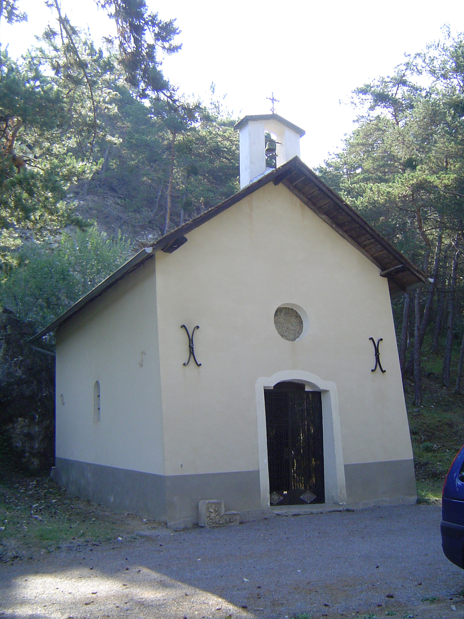 Photo prise à Notre-Dame-du-Laus